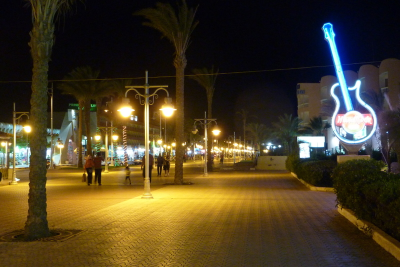 Hurghada Promenade bei Nacht